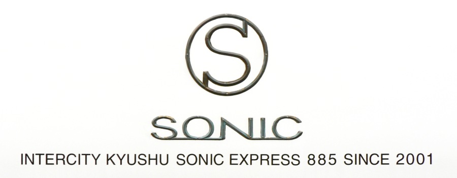 JR九州885系電車、2次車編成のエンブレム。車体側面のもの(写真)は、SM8,10,11編成では撤去済み(SM9編成は不明)。先頭部の小さいものと、車体側面のペイント(フィルム?)による黒色のものは現存。